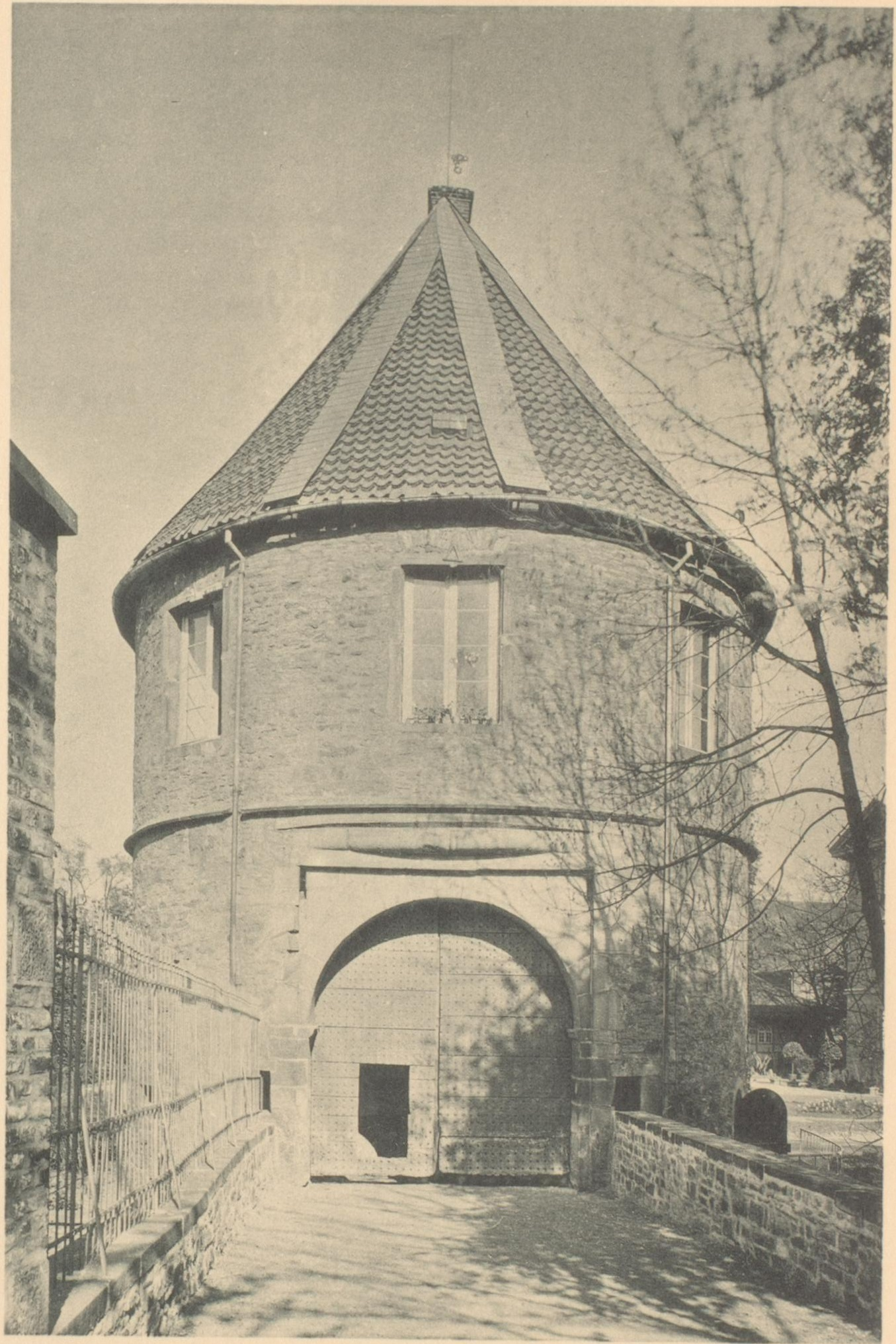 Die Rückseite des Torhauses vom Schloss Brünninghausen um 1890.